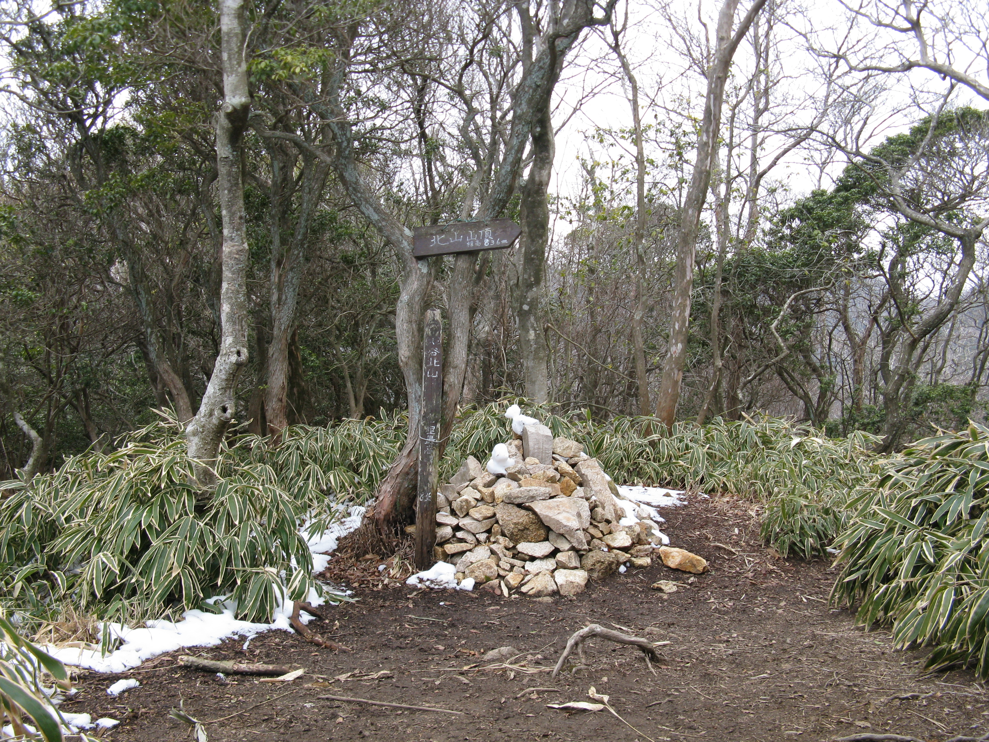 蛇谷北山